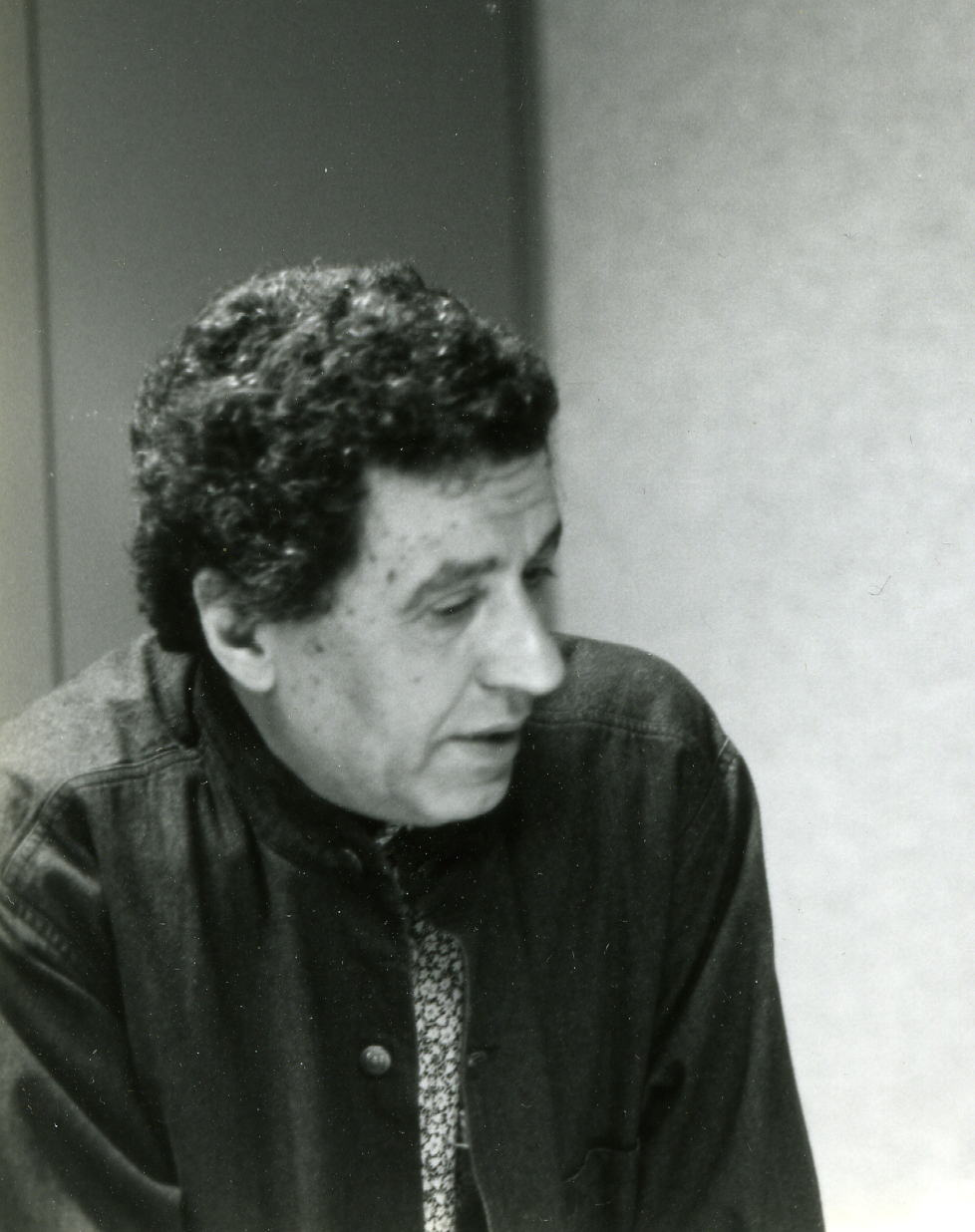 Le peintre algérien Abdallah Benanteur